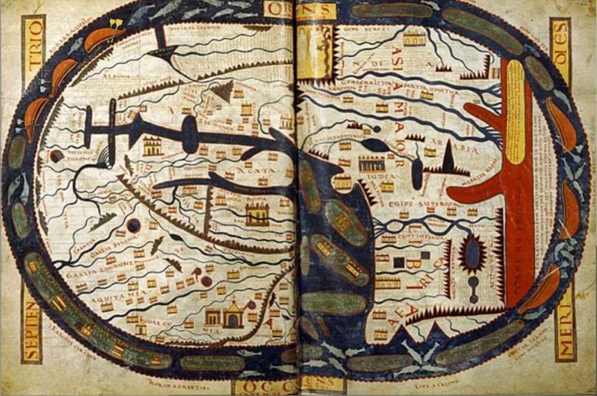 Paříž I